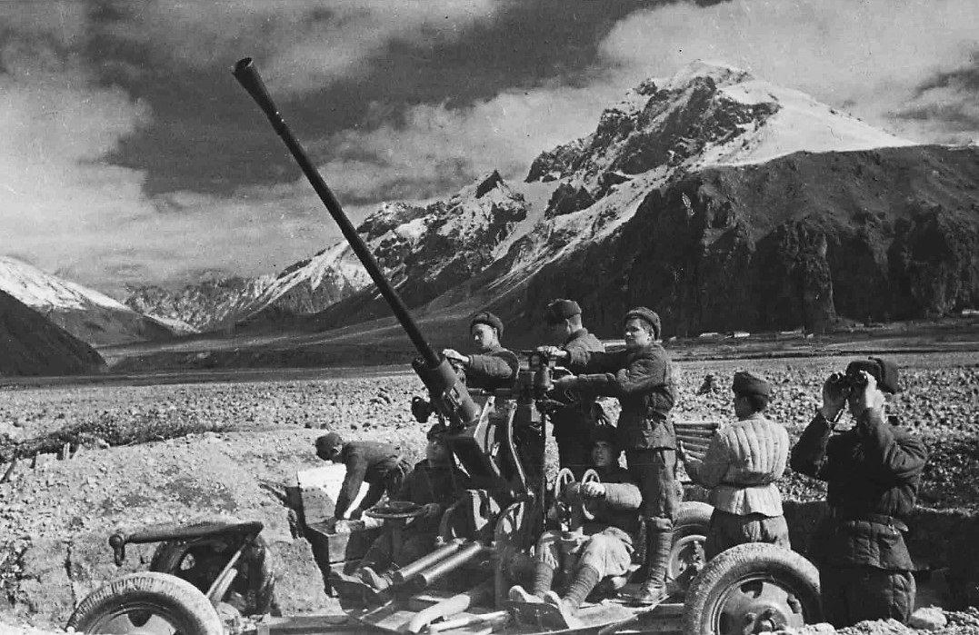 Юго-восточнее Нальчика. Расчёт зенитного орудия командира сержанта И. И. Шанина (первый справа), уничтоживший 2 немецких самолёта, ведёт огонь по фашистским стервятникам